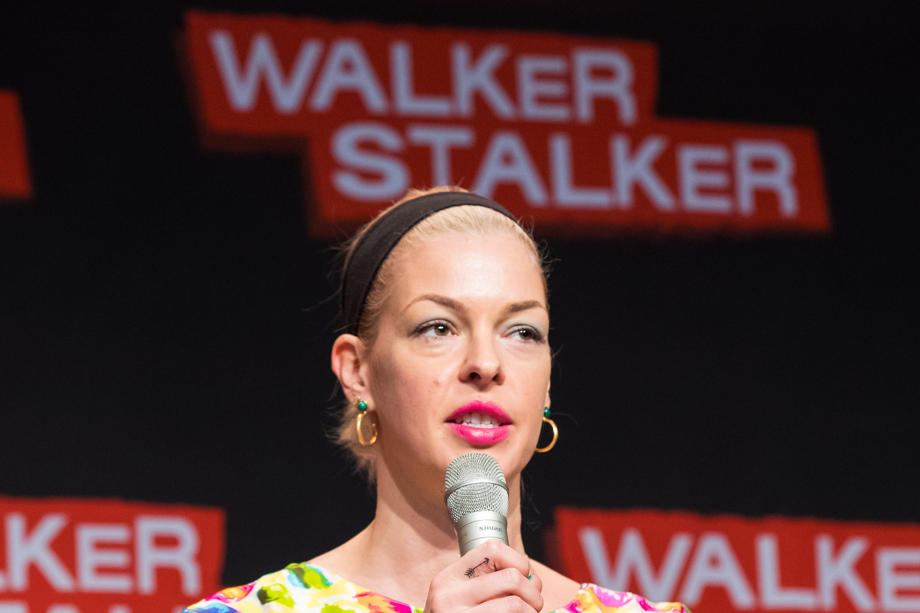 Pollyanna McIntosh during Walker Stalker Con at Maimarkthalle, Mannheim, Baden-Württemberg, Germany on 2018-03-17, Photo: Sven Mandel